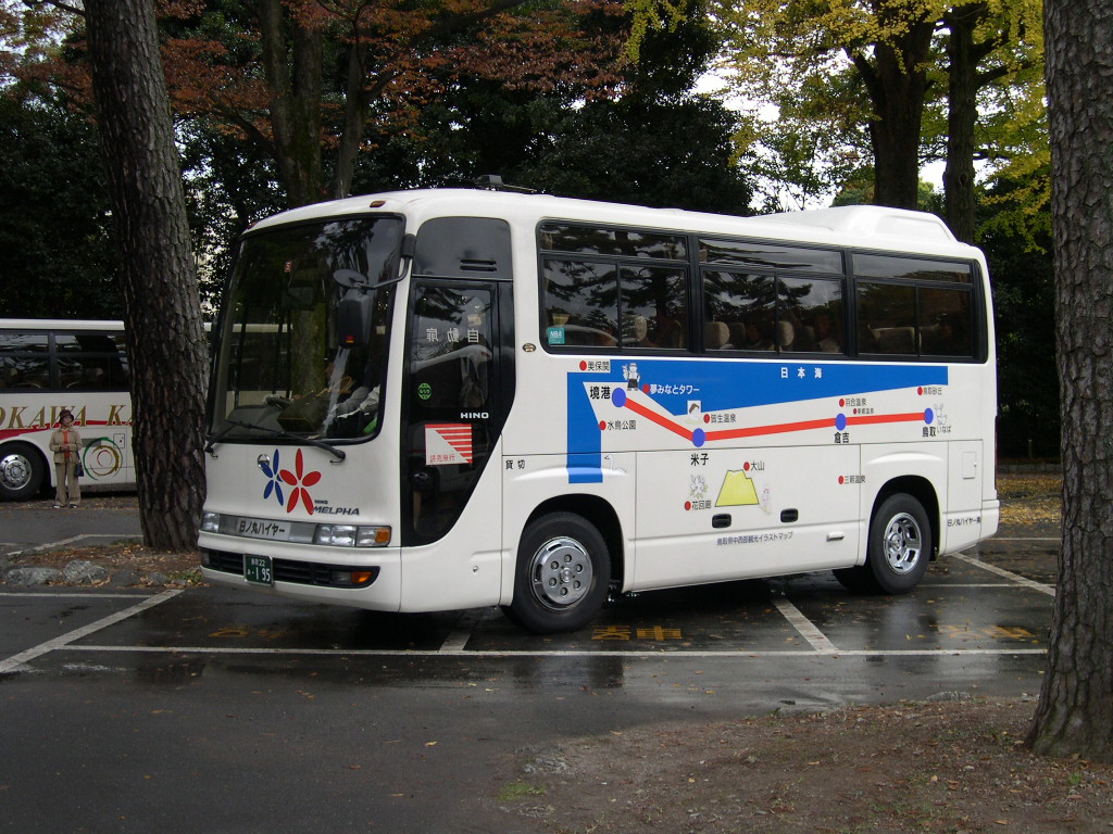 2003-11-9 京都市内にて撮影